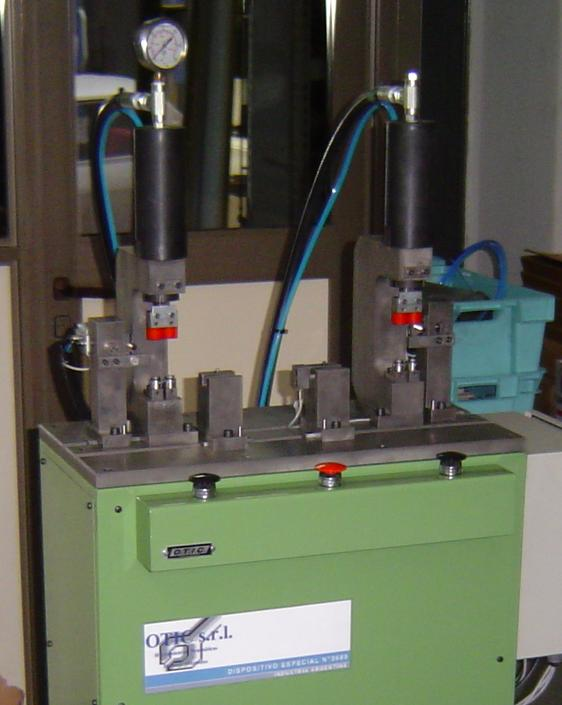 Ejemplo clinchadora multiple de 4 puntos.